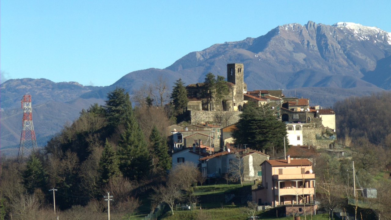 Il Borgo di Pulica, frazione del Comune di Fosdinovo, provincia di Massa Carrara